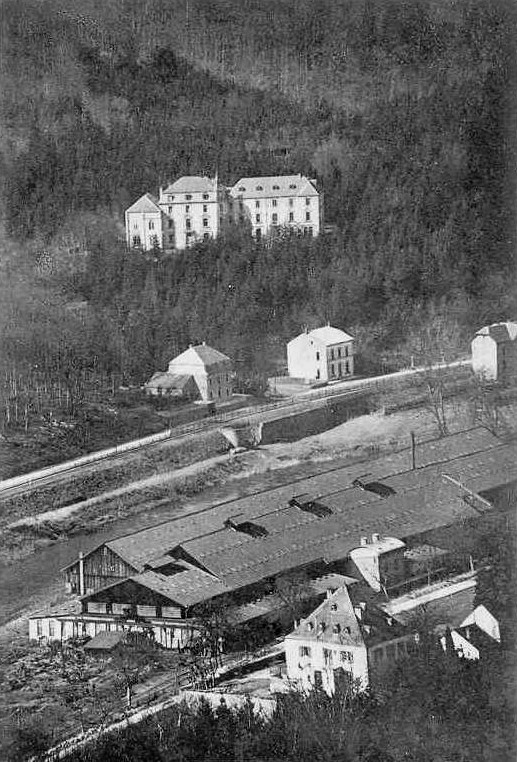 Weilerbaach mam "Institut Heliar", vum J.M. Bellwald gesinn.